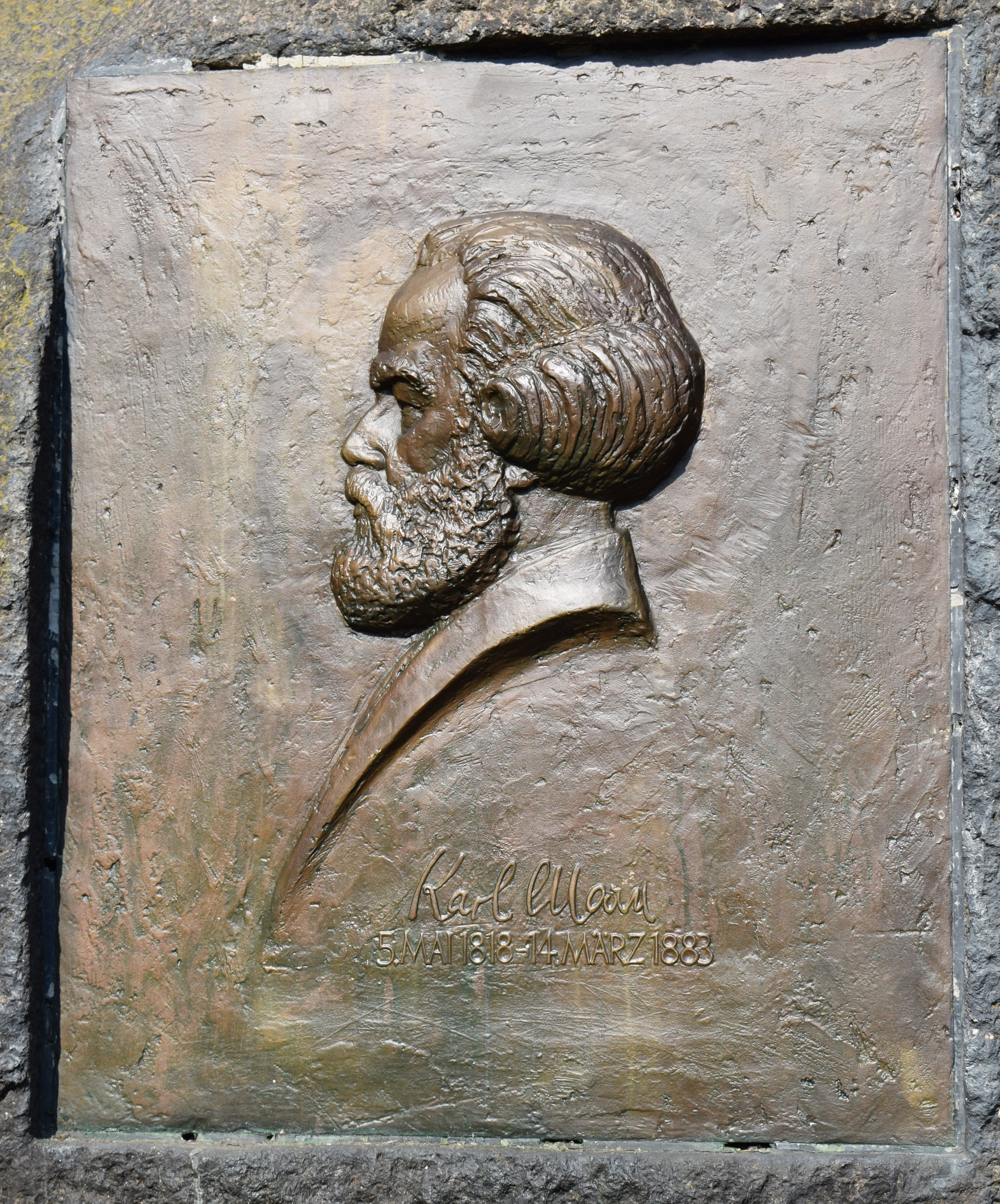 Plakette des Karl-Marx-Denkmals in Fürstenwalde